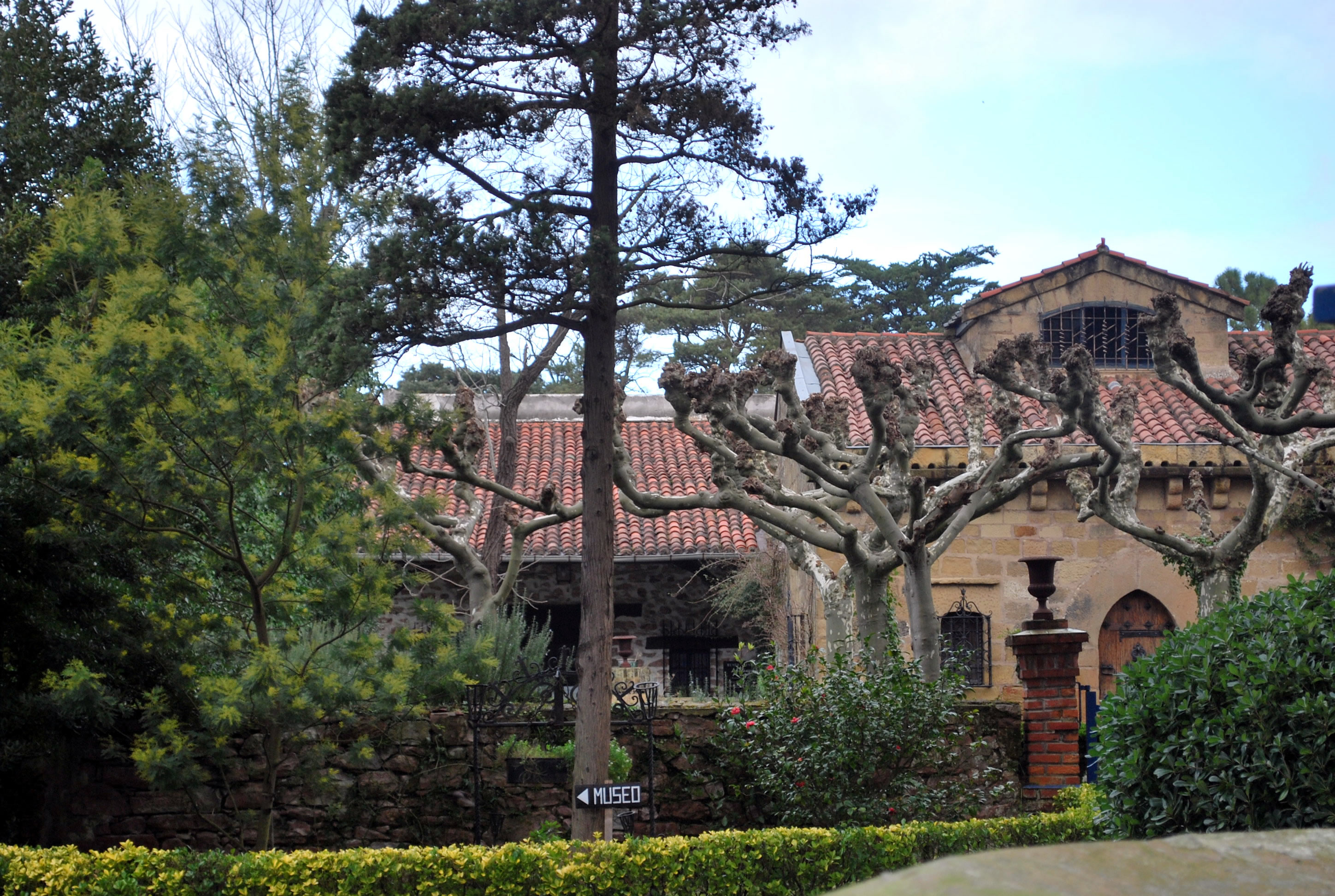 Musée Zuloaga près du port de plaisance de Zumaia (Guipuscoa).